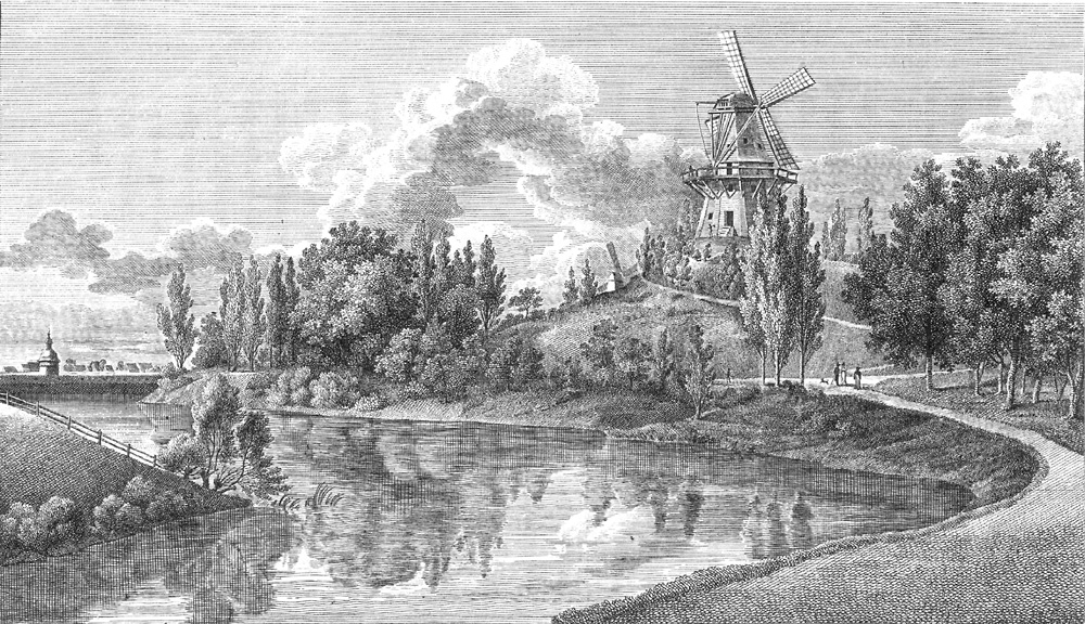 Bildvorlage von Anton Radl (1774–1852) aus dem Jahr 1818/1819: Alter Wall mit der Mühle auf der Altmannshöhe (1893 abgerissen) aus Richtung Ostertor-Wache. Links der sogenannte „Bär“ (Batardeau) mit Schleusen, um das Weserwasser in den Stadtgraben zu lassen